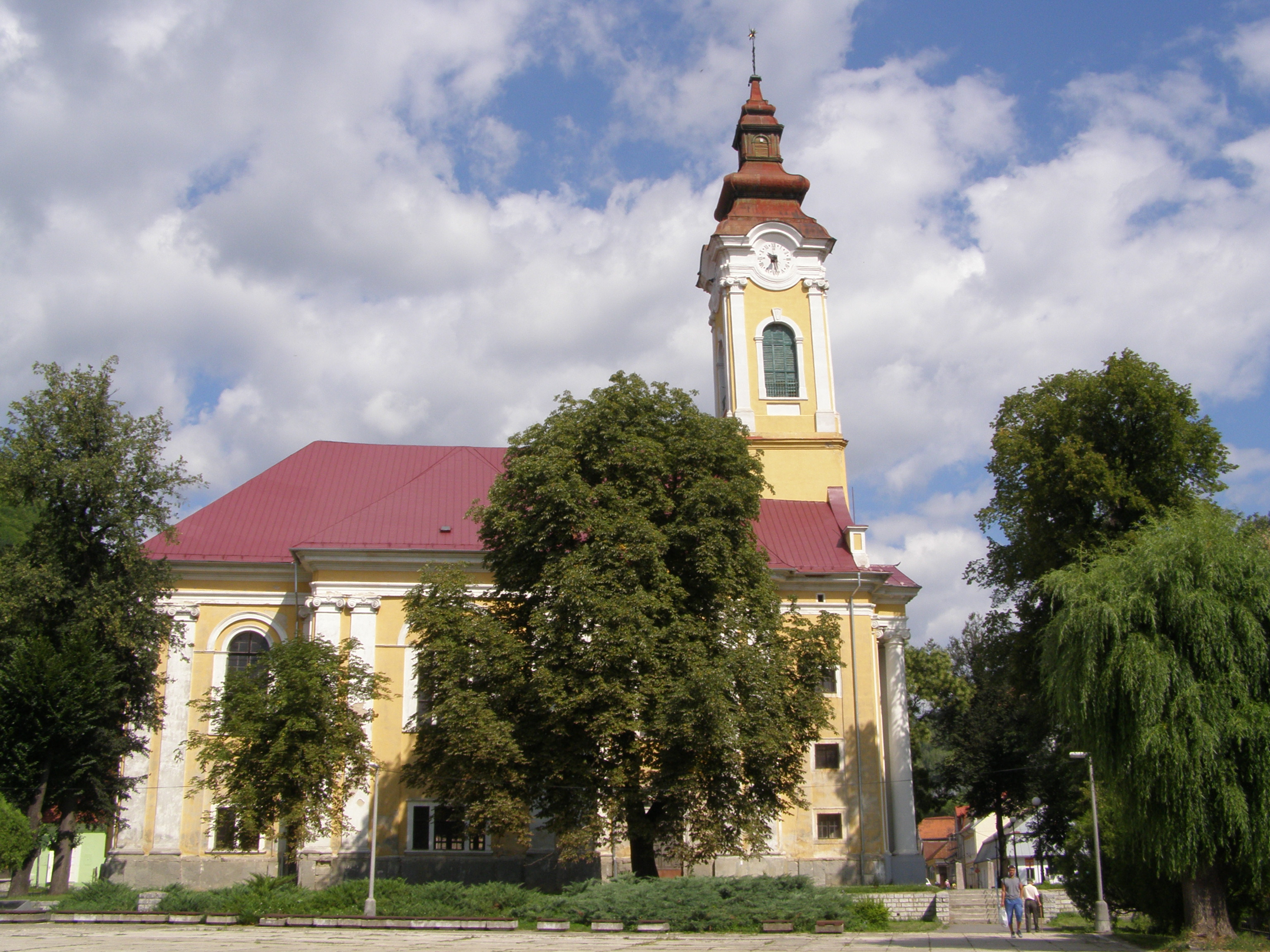 Tisovec (okres Rimavská Sobota), evangelický kostel